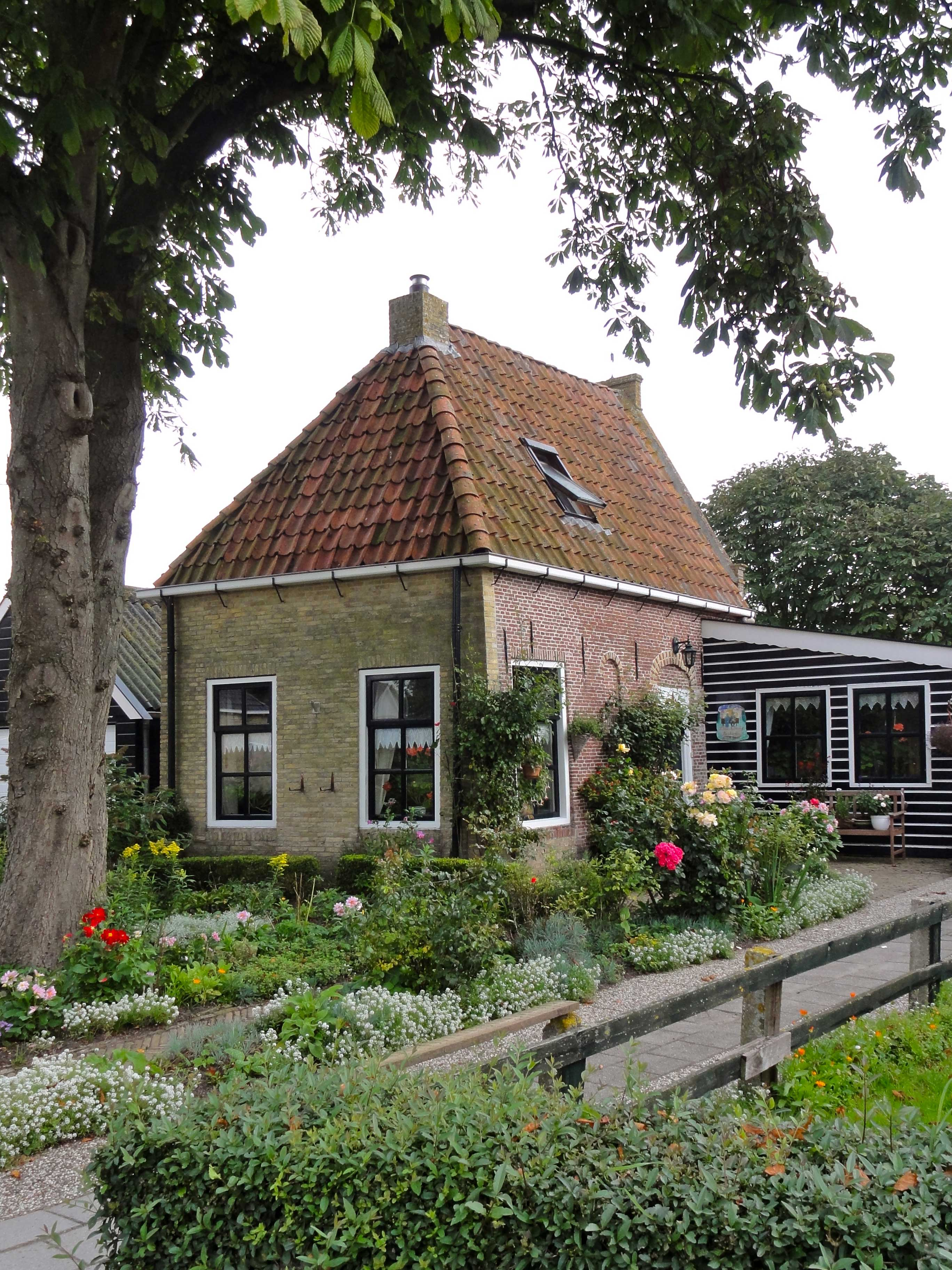 Hellingstrjitte 8 Molkwerum, huis uit 1697